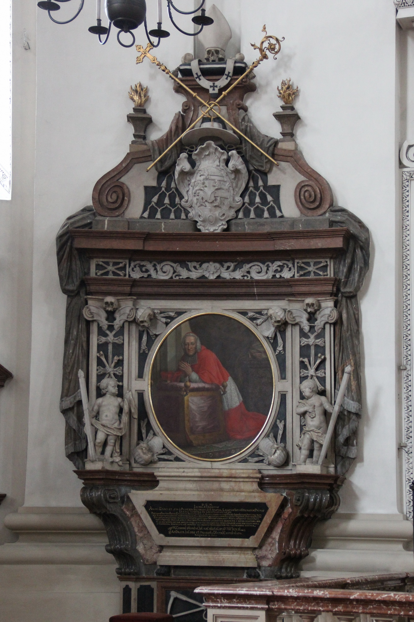 Salzburg Cathedral - cenotaph Archbishop Jakob Ernst Graf von Liechtenstein-Kastelkorn